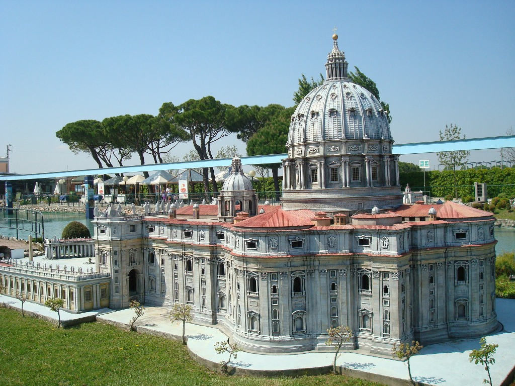 Italie en miniature (Rimini)- le vatican (vue de côté)